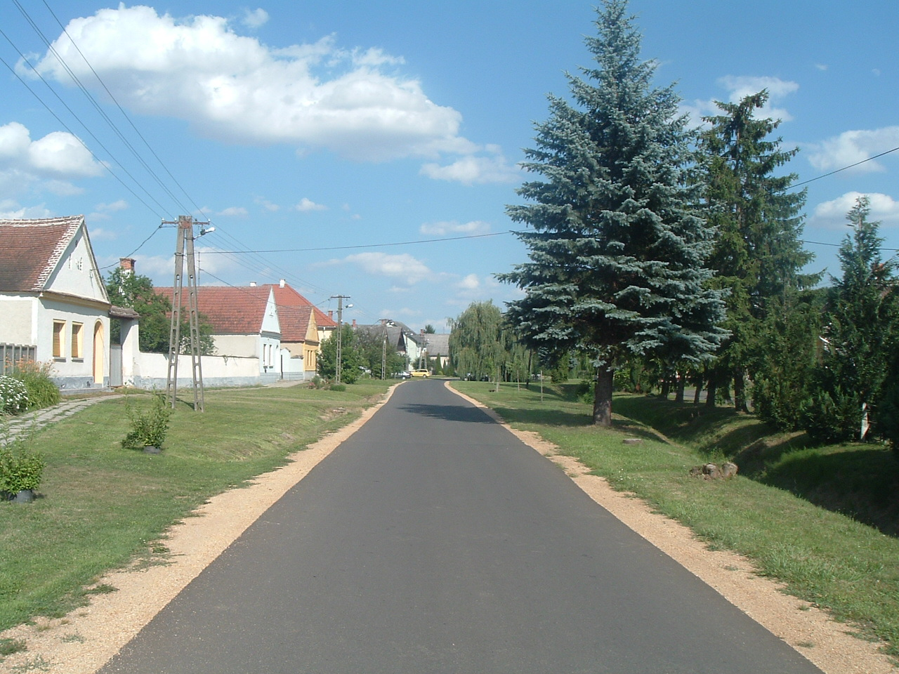 Horvátzsidány